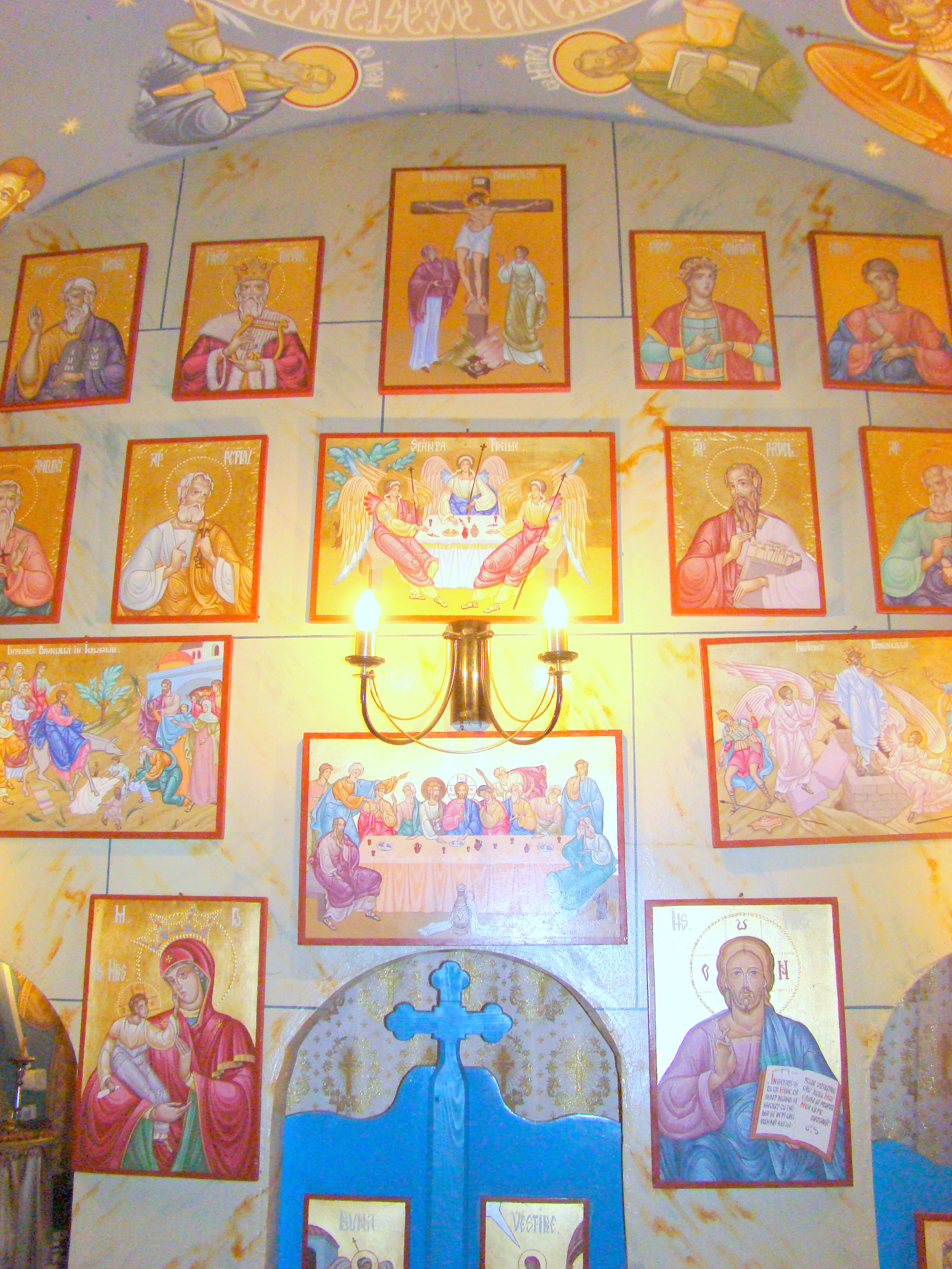 Biserica de lemn „Sf. Teodor Tiron" din Brătești, județul Bihor